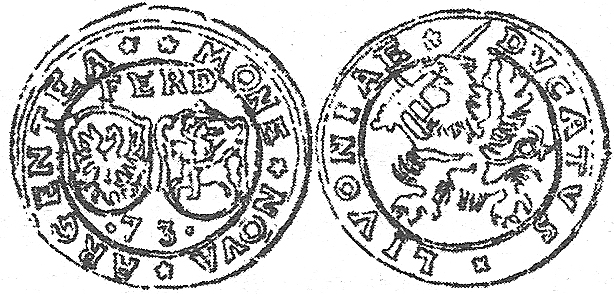 Ferton kurlandzki 1572r